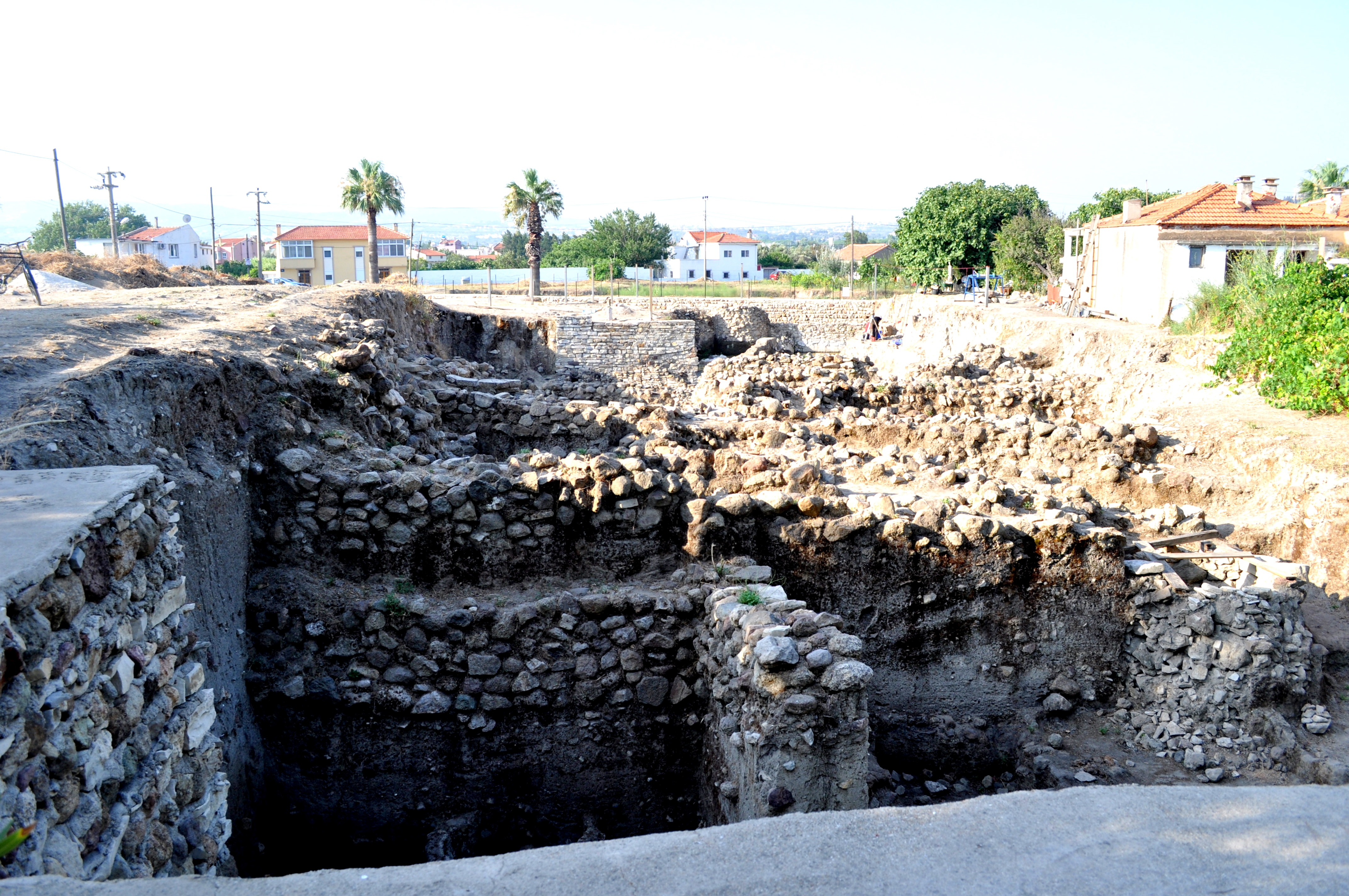 Τοποθεσία Λιμάν τεπέ, Βουρλά, Τουρκία.